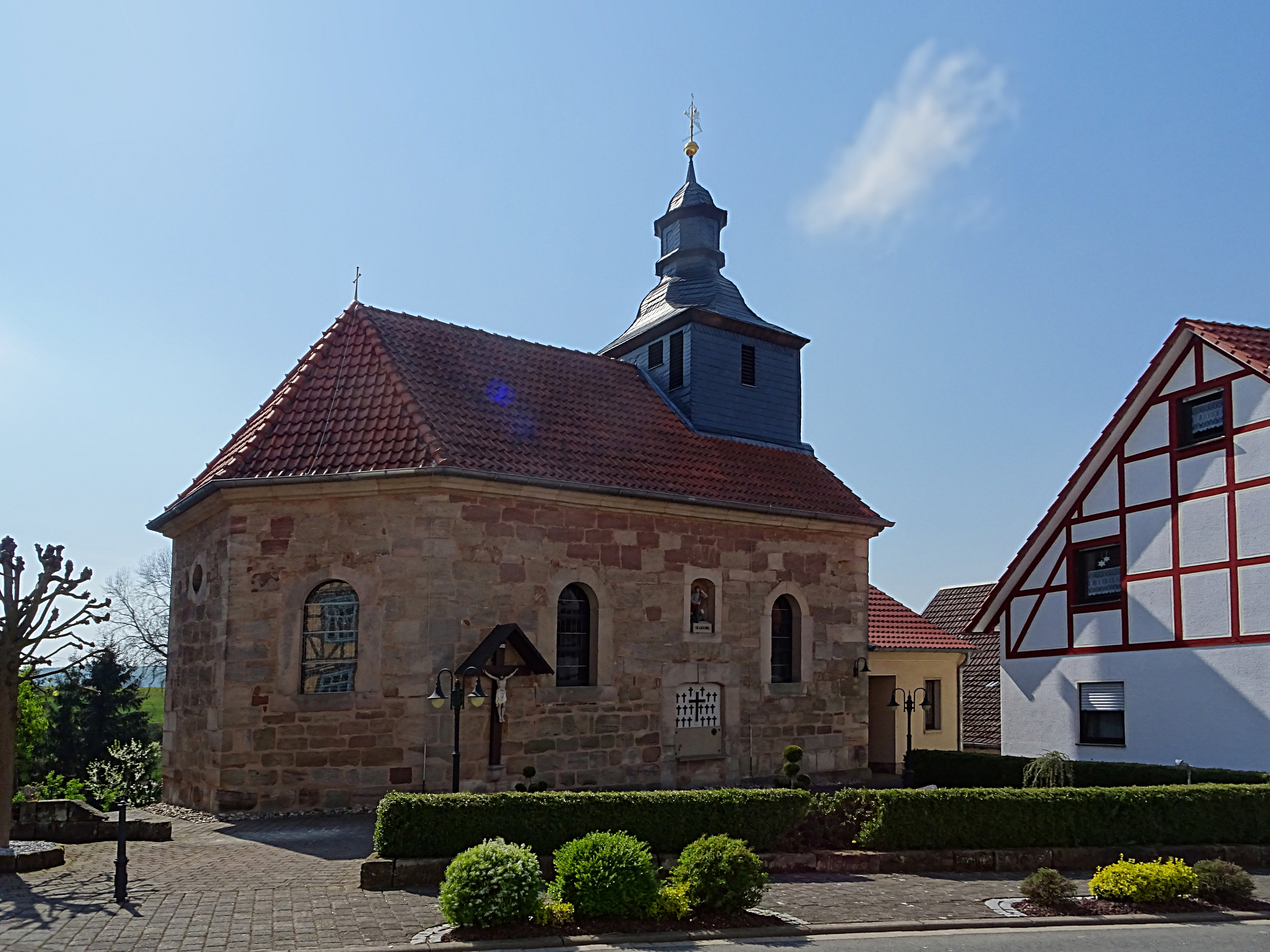 Dorfkirche St. Georg in Dieterode